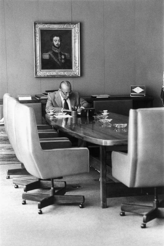 Figueredo ao fundo o imperador Dom pedro I